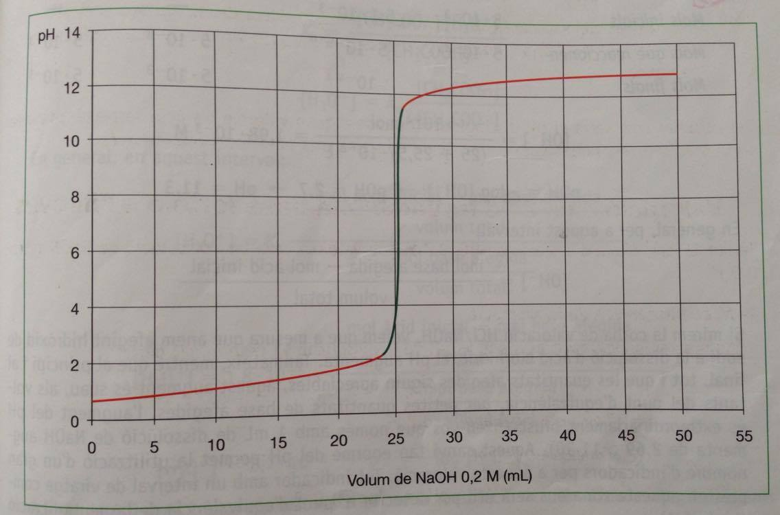 corba